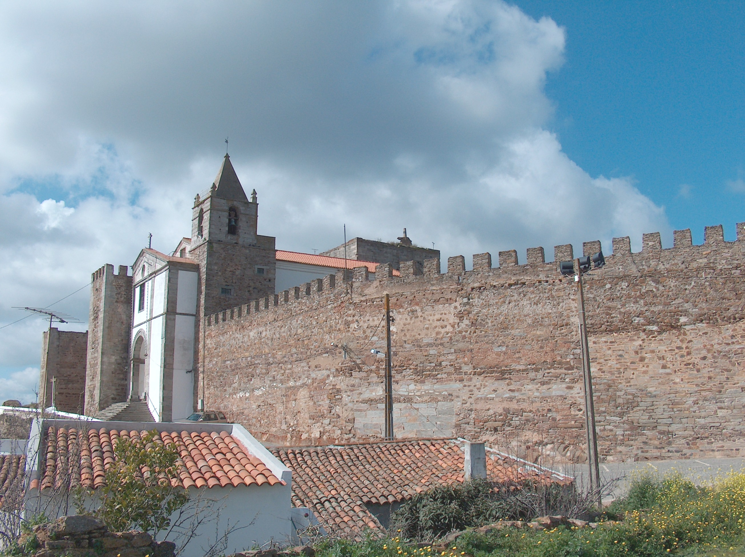 Castelo de Mourão,(freguesia e concelho de Mourão, distrito de Évora).